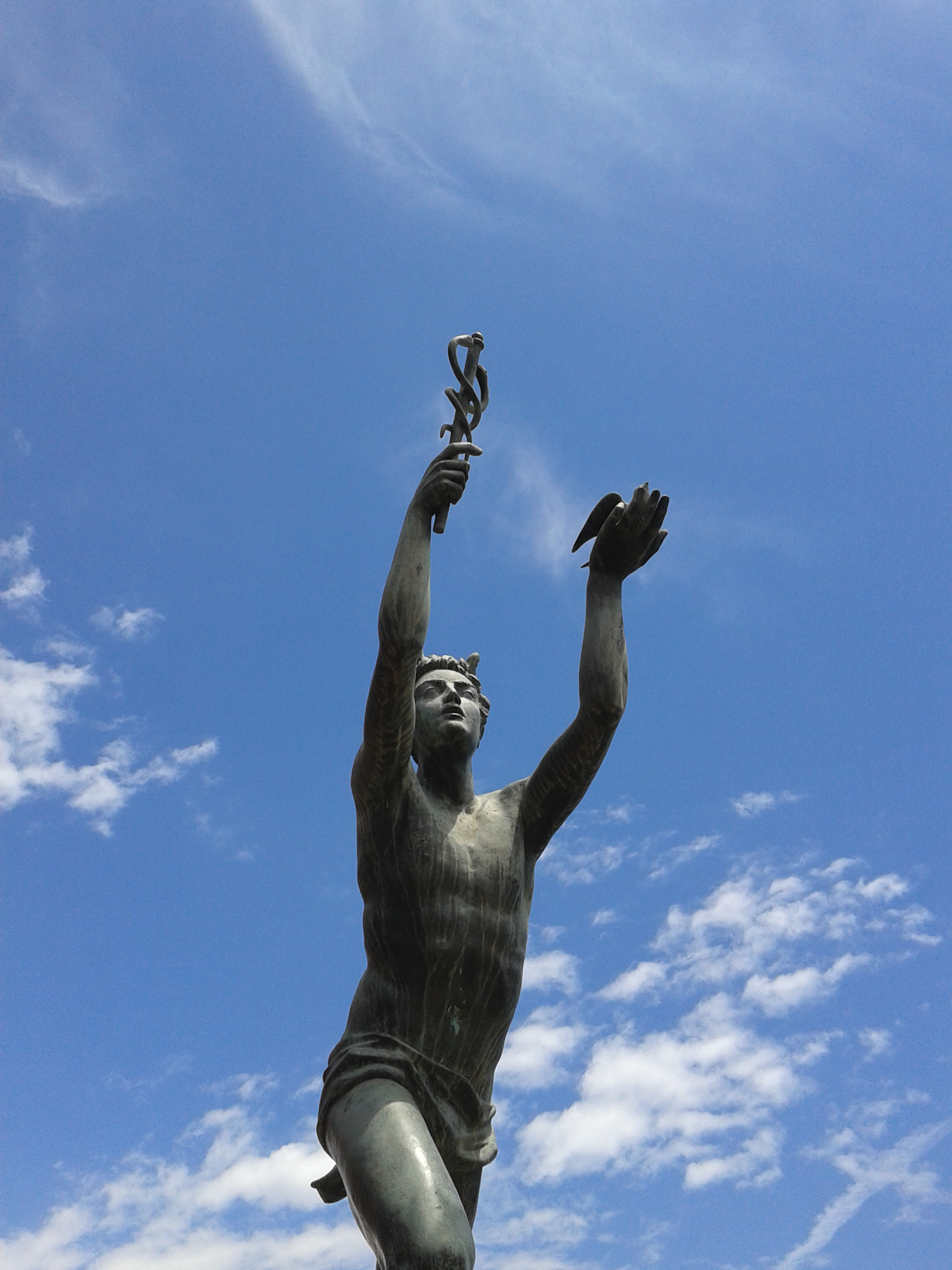 Escultura al monument a Miquel Biada (1948) por Joaquim Ros i Bofarull